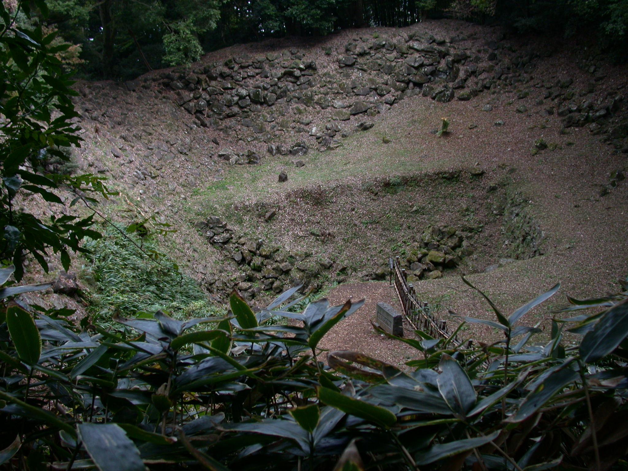 Idokuruwa